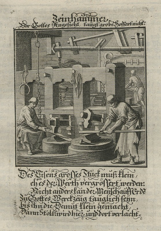 Original image description from the Deutsche Fotothek Ständebuch & Beruf & Handwerk & Schmiede & Hammer & Hammerwerk & Stahl & Eisen